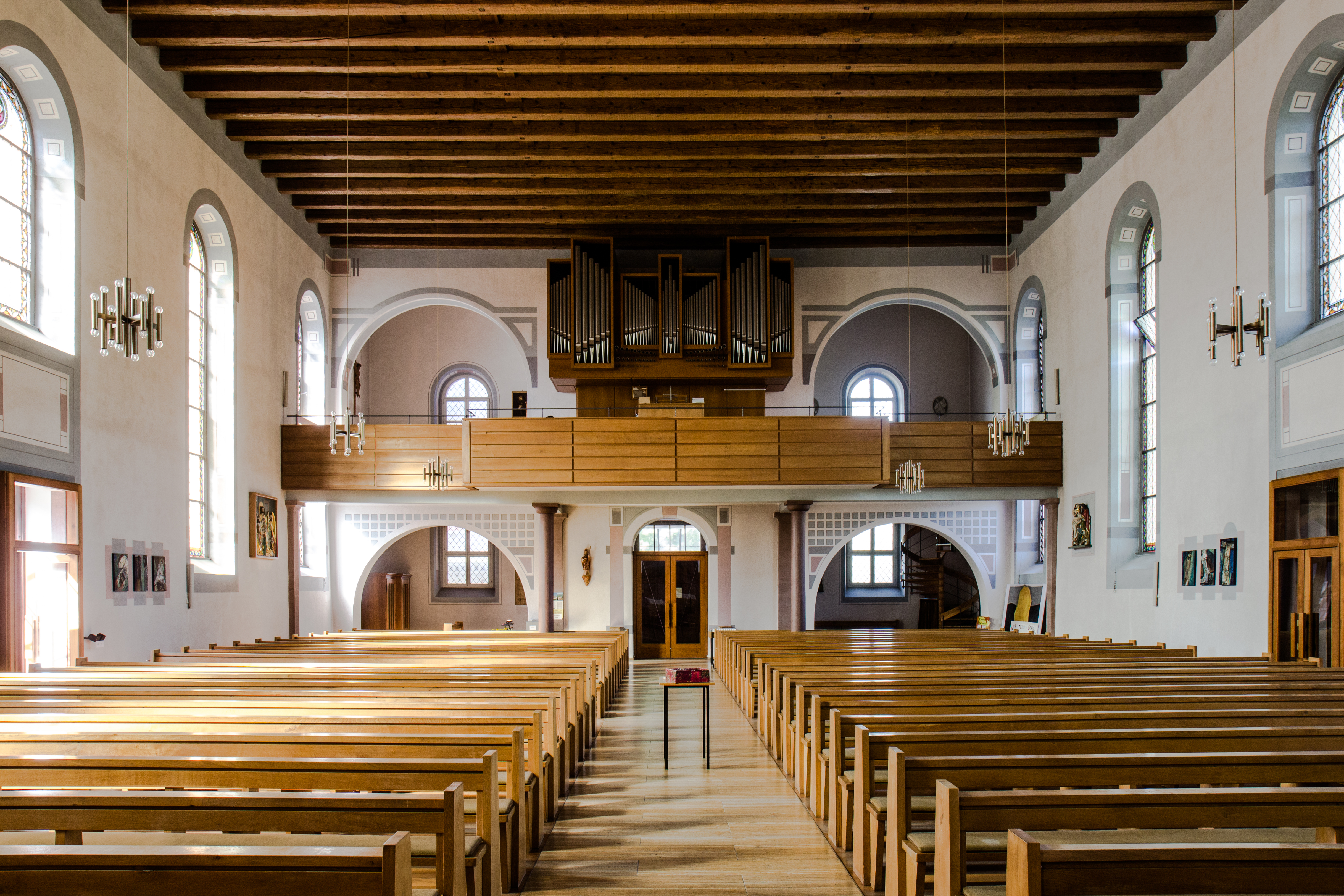 St. Bartholomäus (Ortenberg)